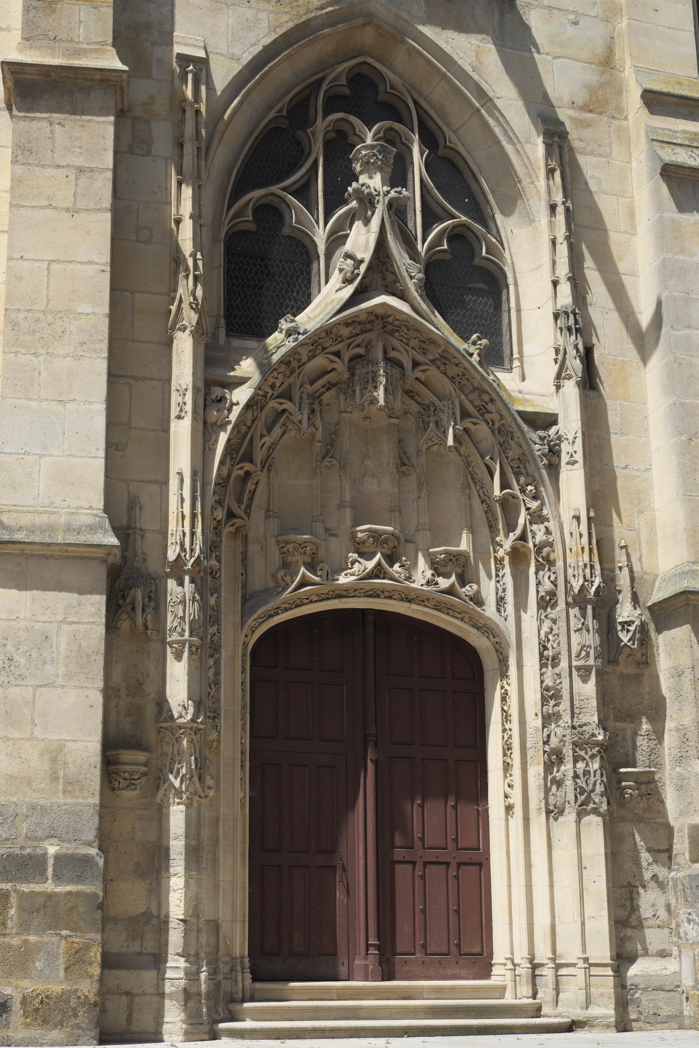 Katholische Pfarrkirche Saint-Aspais in Melun im Département Seine-et-Marne (Region Île-de-France/Frankreich), Seitenportal